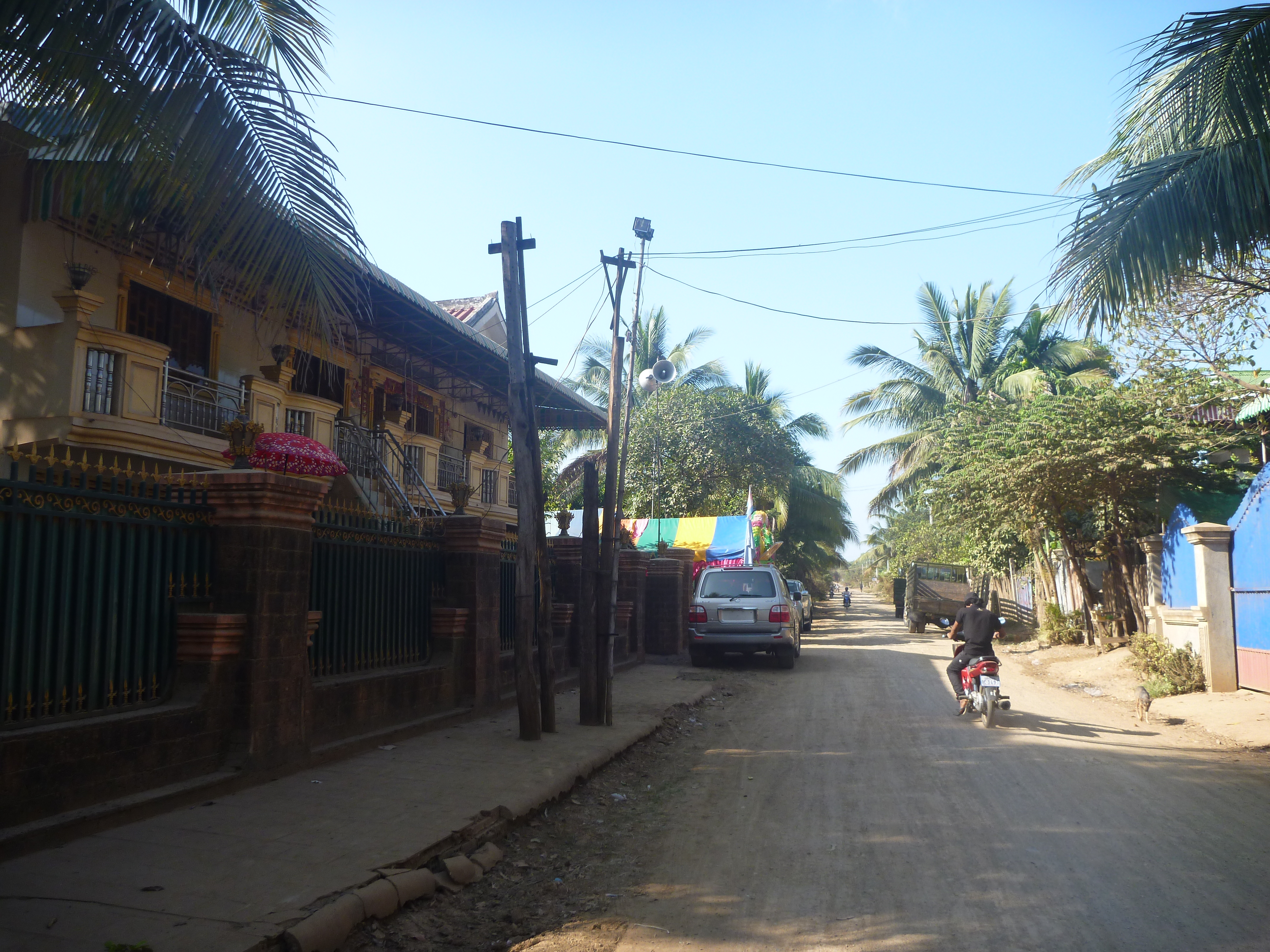 Roade view